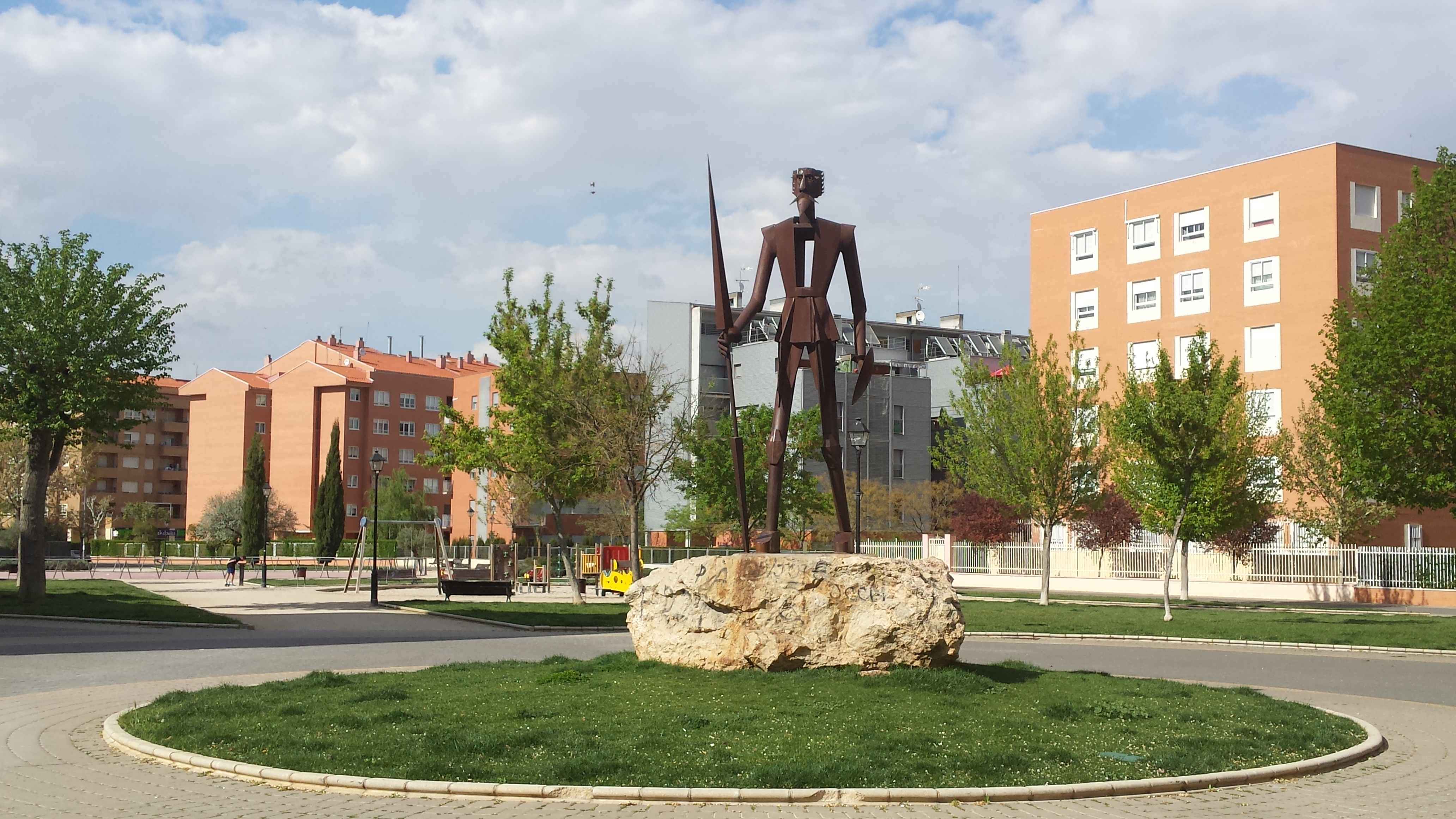 Quijote Albacete. Barrio San Antonio Abad